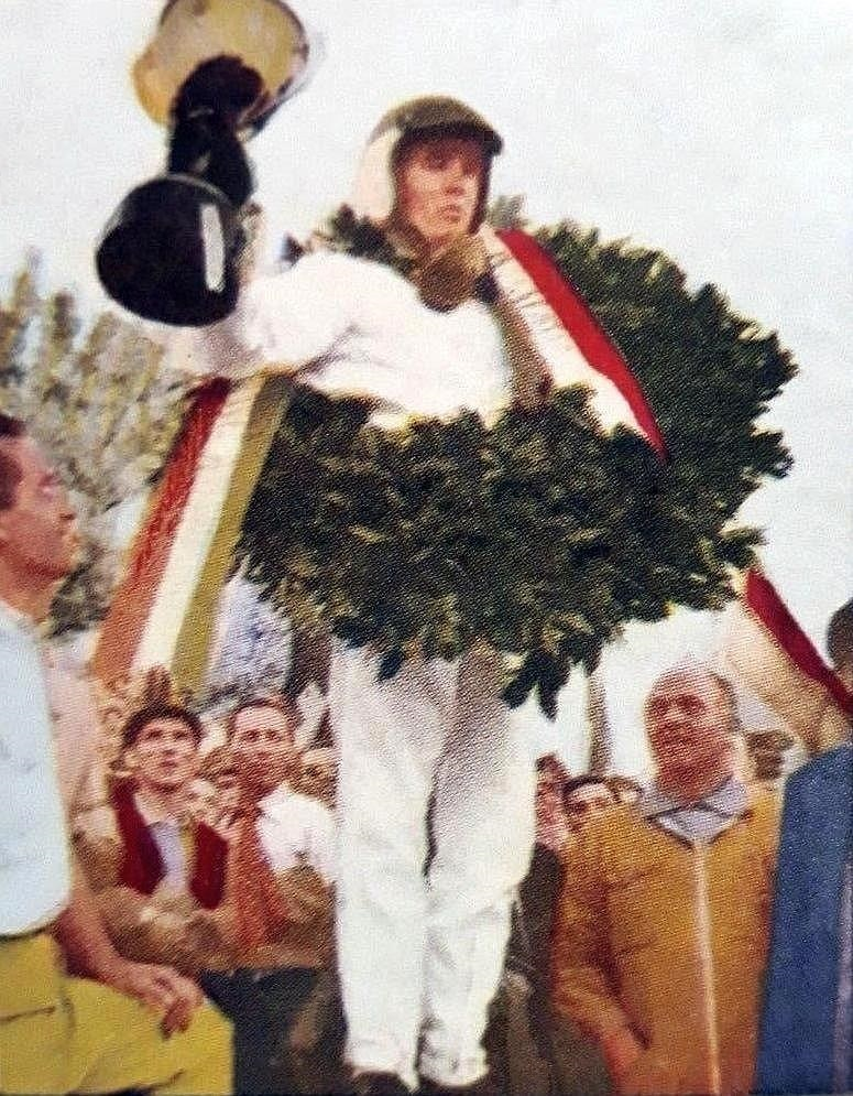 Jackie Stewart vainqueur de son premier Grand Prix en F1 (Italie, Monza 1965), 'Campioni dello Sport', Panini figurina n°79.